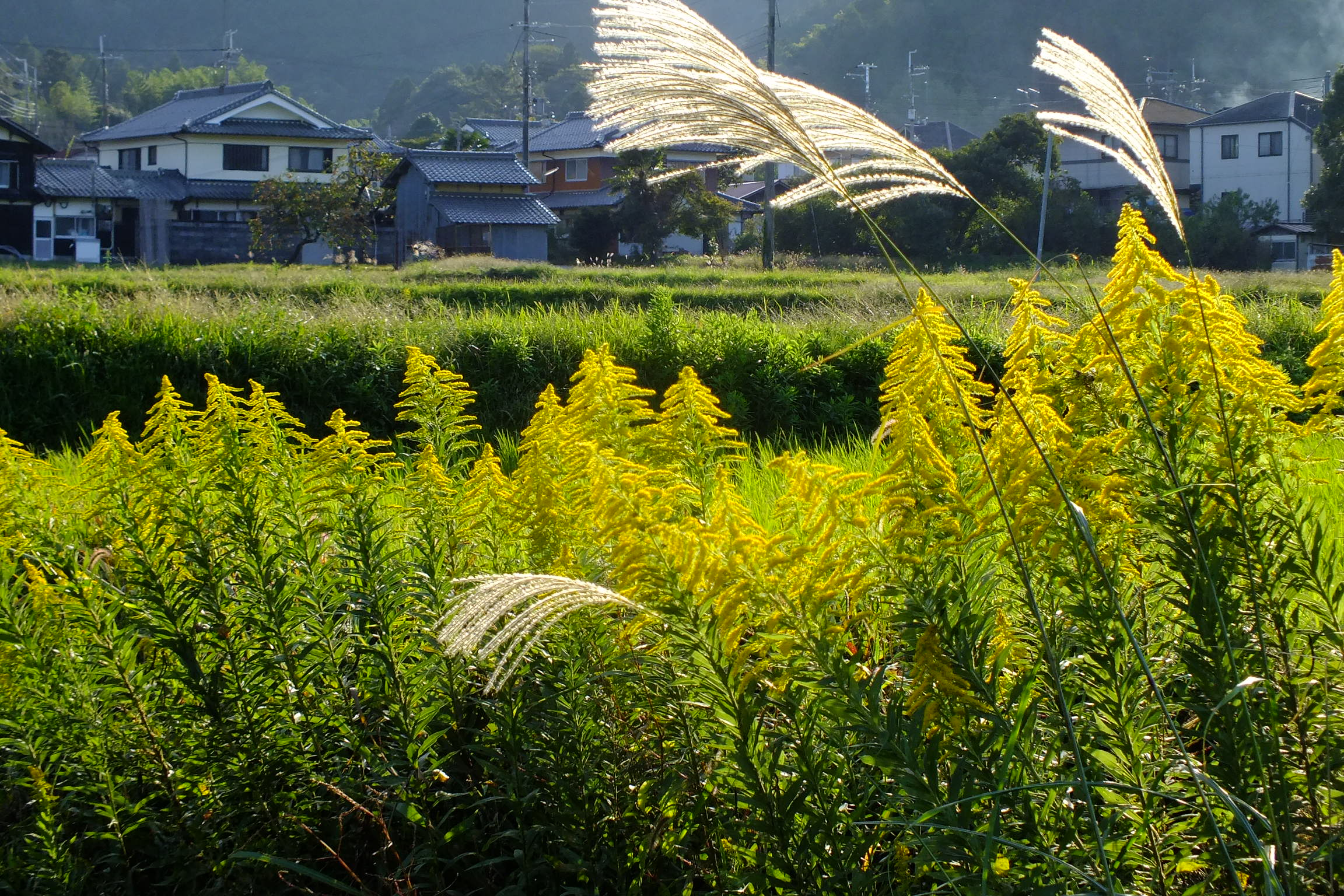 2016-10-15 Solidago canadensis,IN Sasayama,Hyogo セイタカアワダチソウ(篠山市味間)